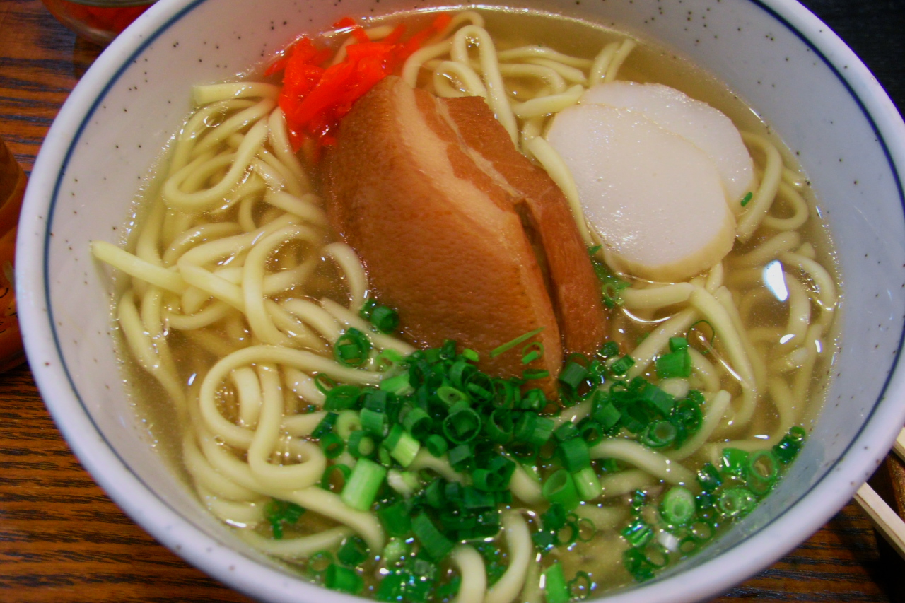 空港の中の食堂で食べた沖縄そば。そばと言いつつも実質うどん。